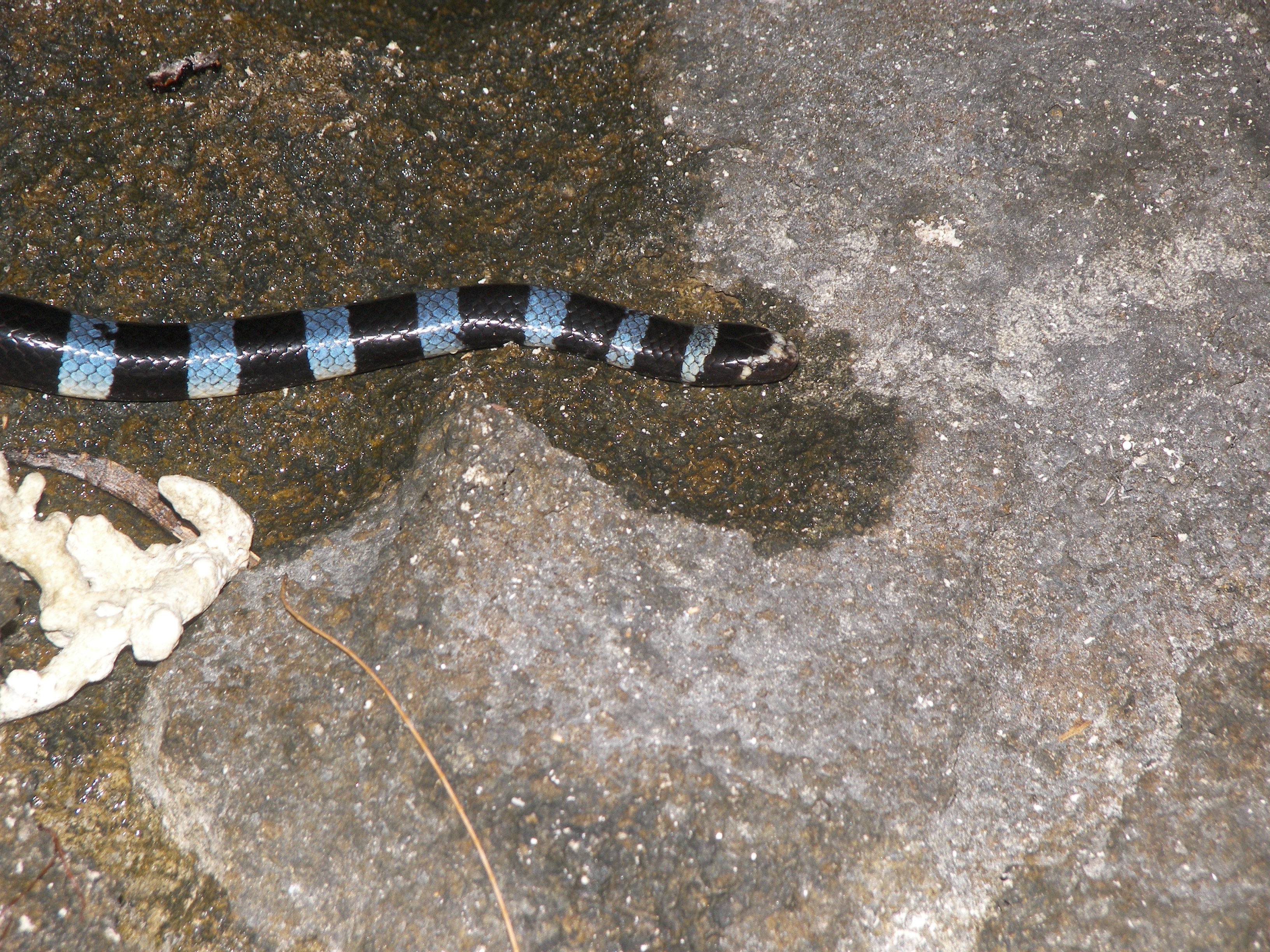 Vue de près d'un tricot rayé de Nouvelle Calédonie